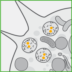 BRINEURA розщеплює поліпептиди в лізосомах і допомагає очистити накопичення в клітині.